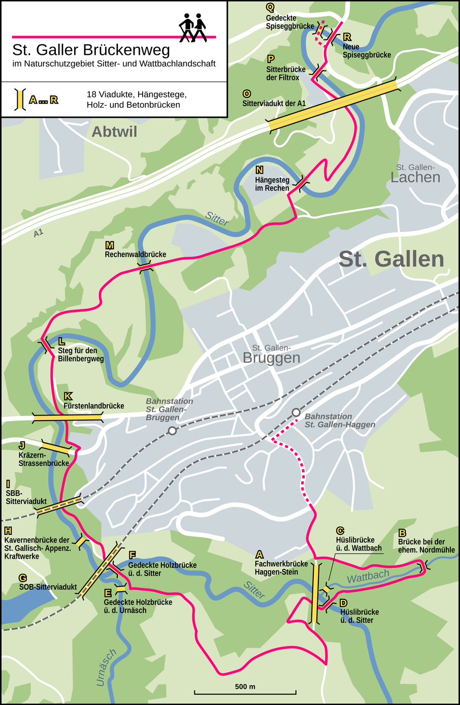 St. Galler Brückenweg, Schweiz